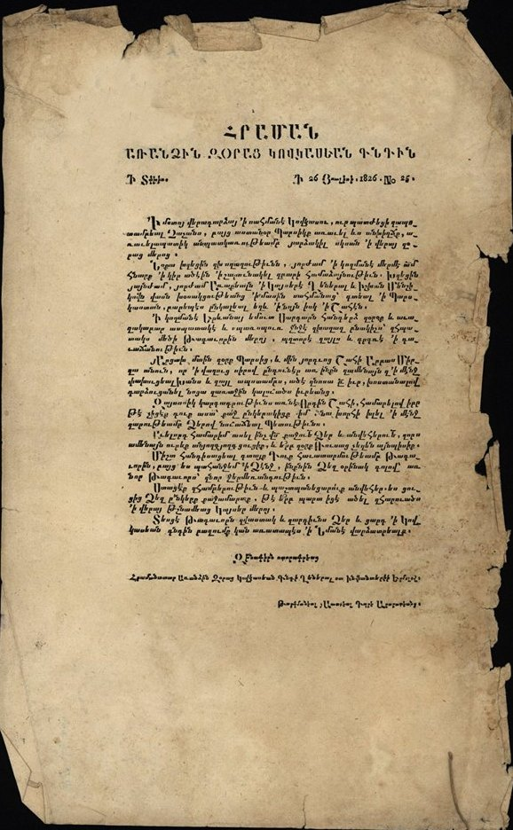 Приказ русского командования на армянском языке